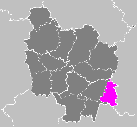 Maps of arrondissements and cantons of France: Arrondissement de Louhans.PNG (Région Bourgogne)